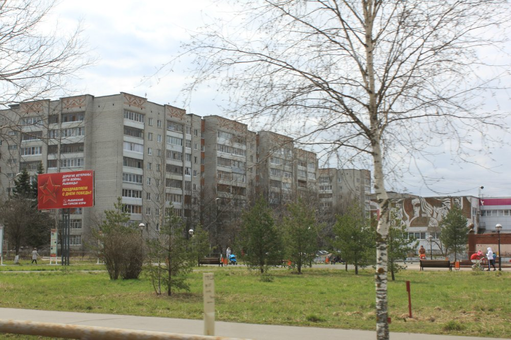 Рыбинск. Микрорайон Волжский